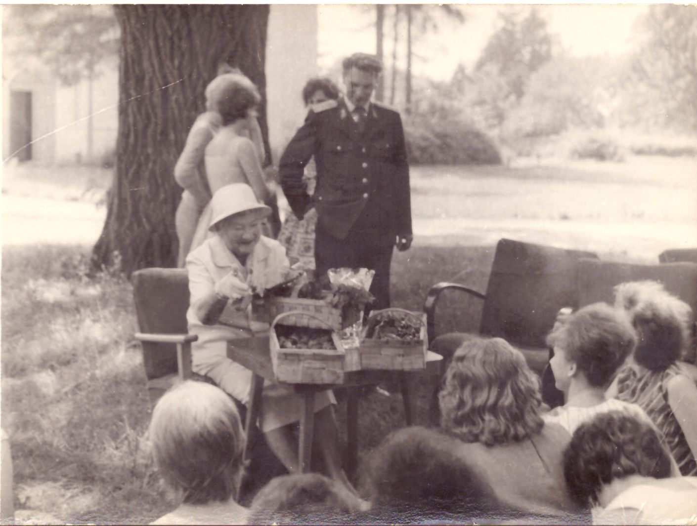 Fotografie neznámého autora (Jiří Zelenka autor kopie z rodinného alba). Spisovatelka Marie Majerová. Zámek Loučeň (13.června 1964).Spisovatelka Marie Majerová, žákyně a žáci Dopravní školy ČD.